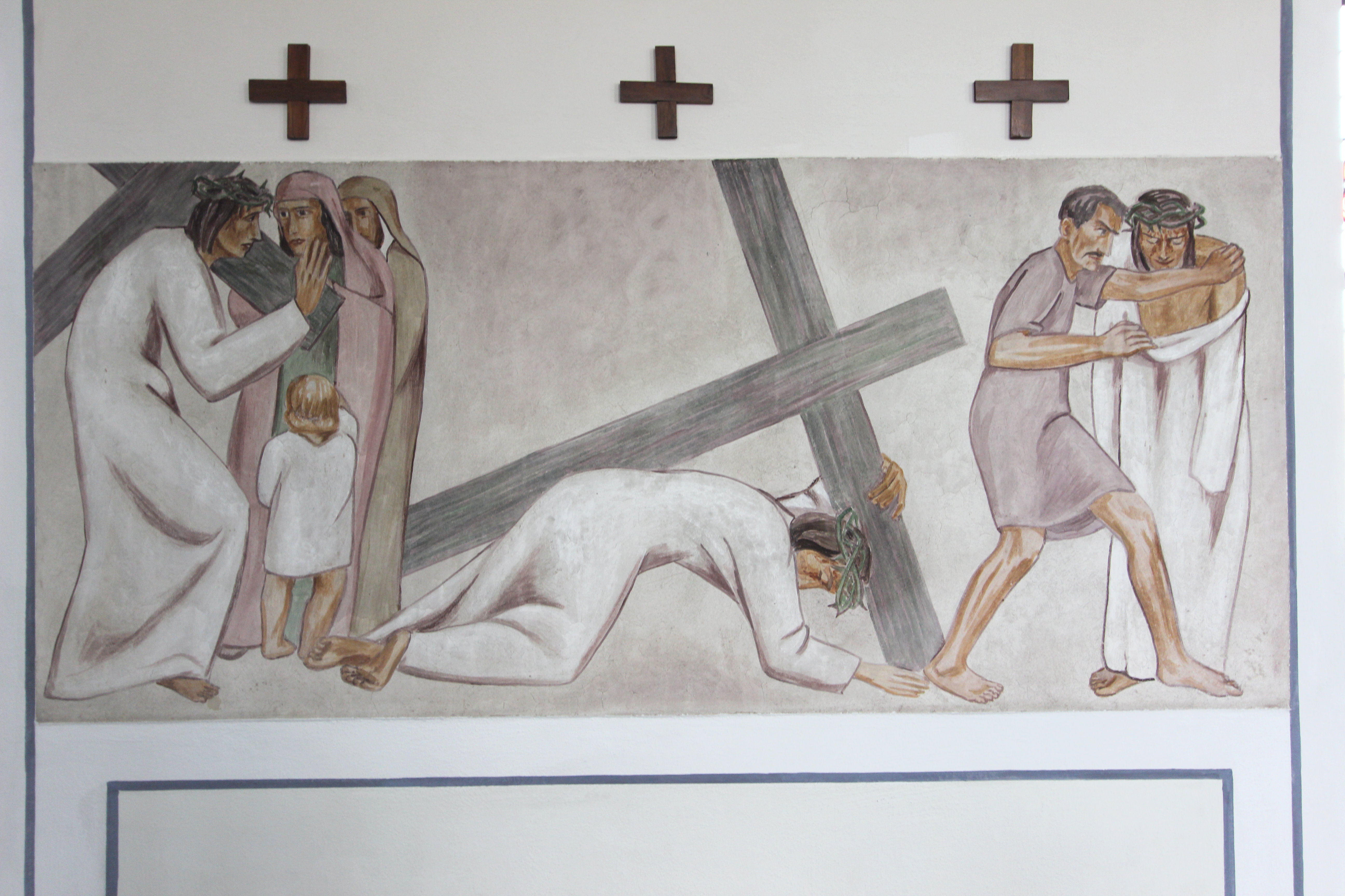 54597 Ormont, Kirchweg 1. Neugotischer Saalbau, 1850. Innenaufnahme von 2017.